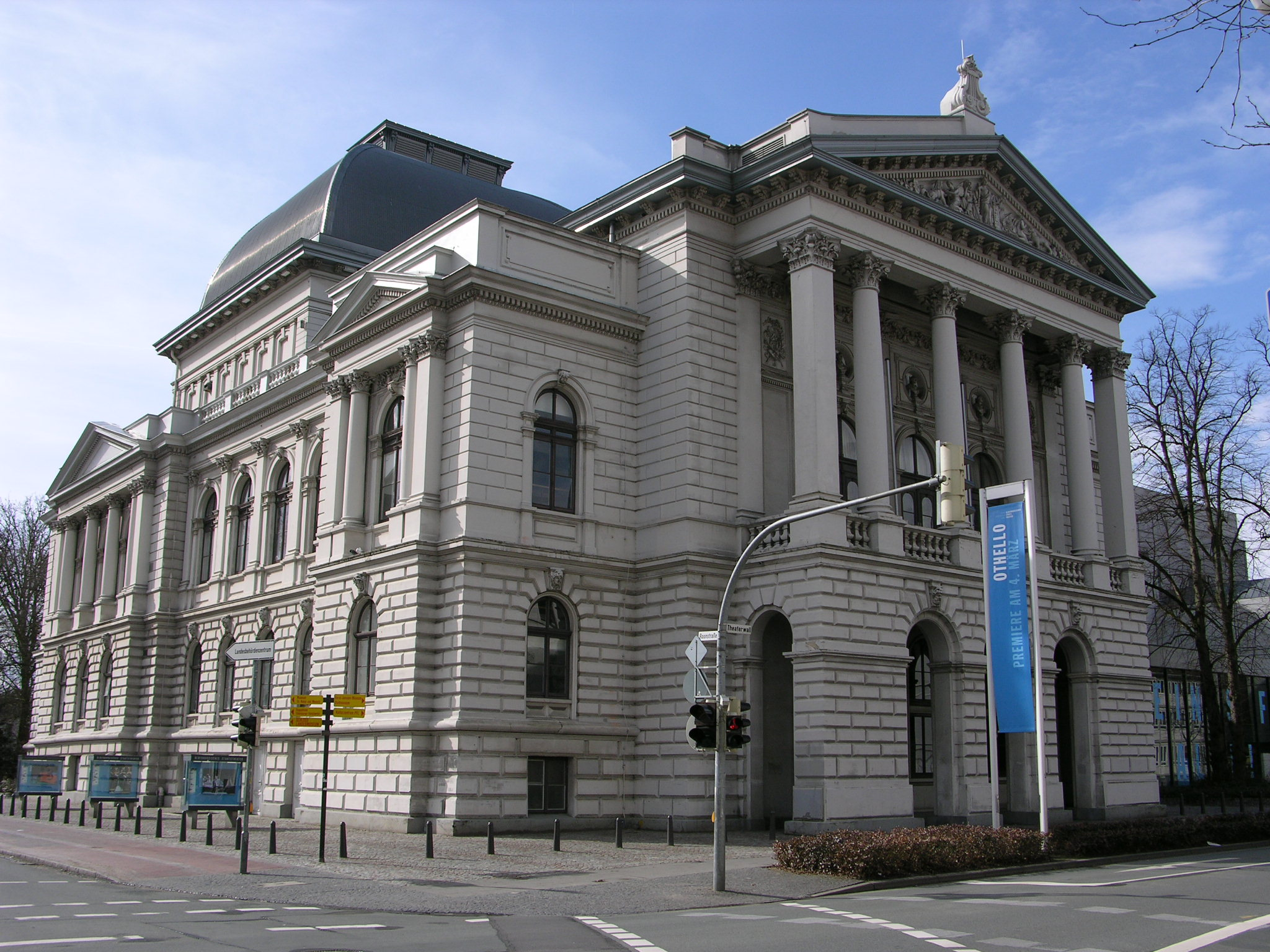 Frontansicht Oldenburger Staatstheater